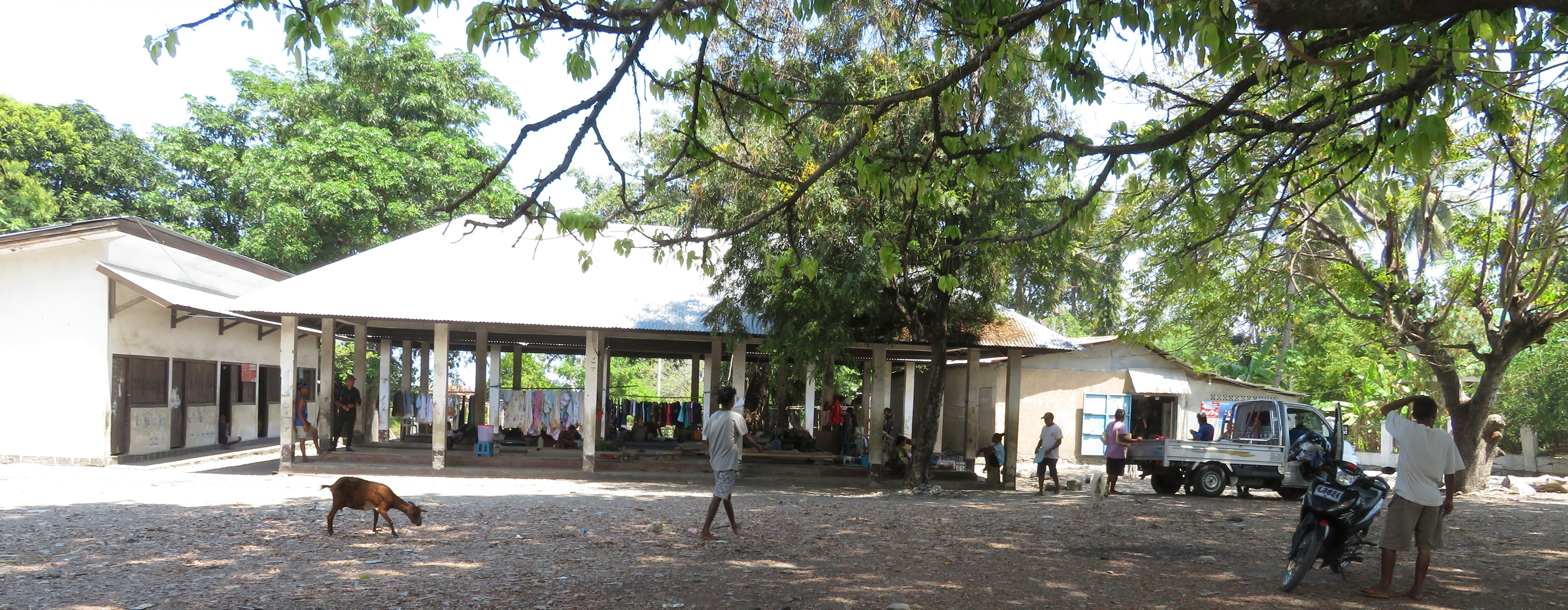 Marktplatz mit Markthalle, Maubara, Timor Leste